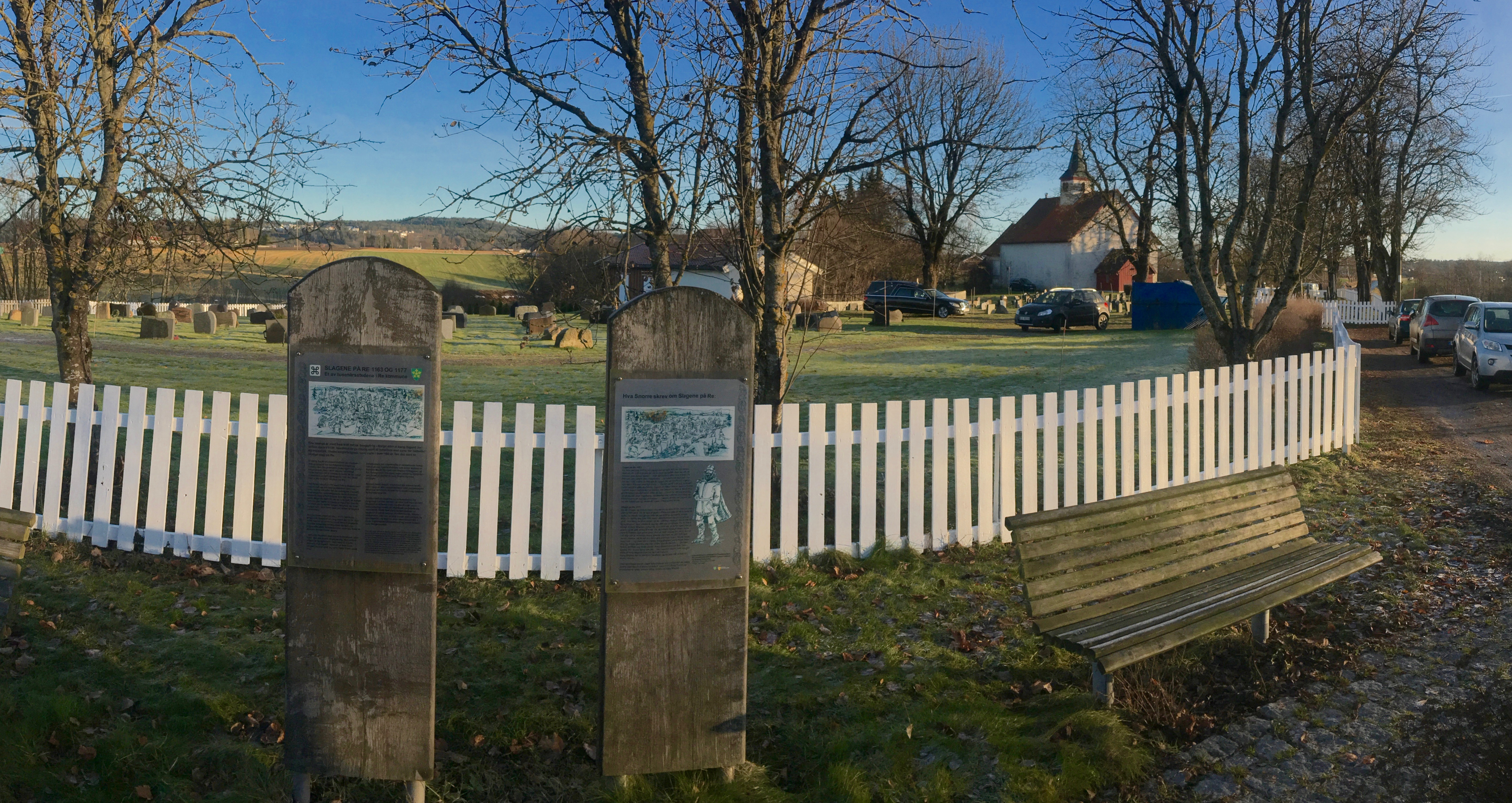 Ramnes kirke i Re kommune i Vestfold. Informasjonstavler om slagene på Re. Beskåret, fortegnet panoramabilde.